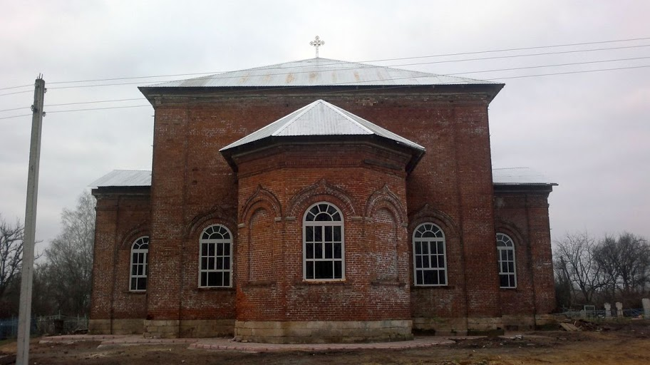 Церковь "Воскресения Христова" село Долгое Киреевский район Тульской области осень 2012 года.